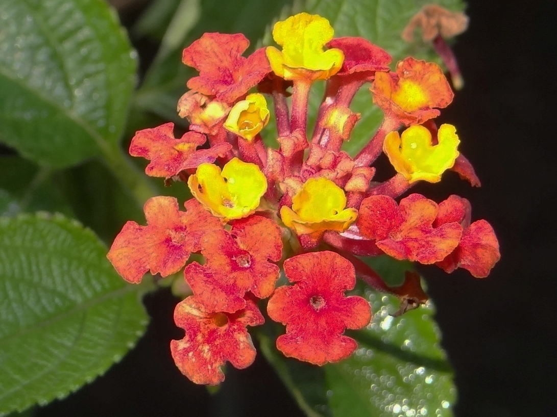 Lantana camara (location:Botanical Garden in Cracow)